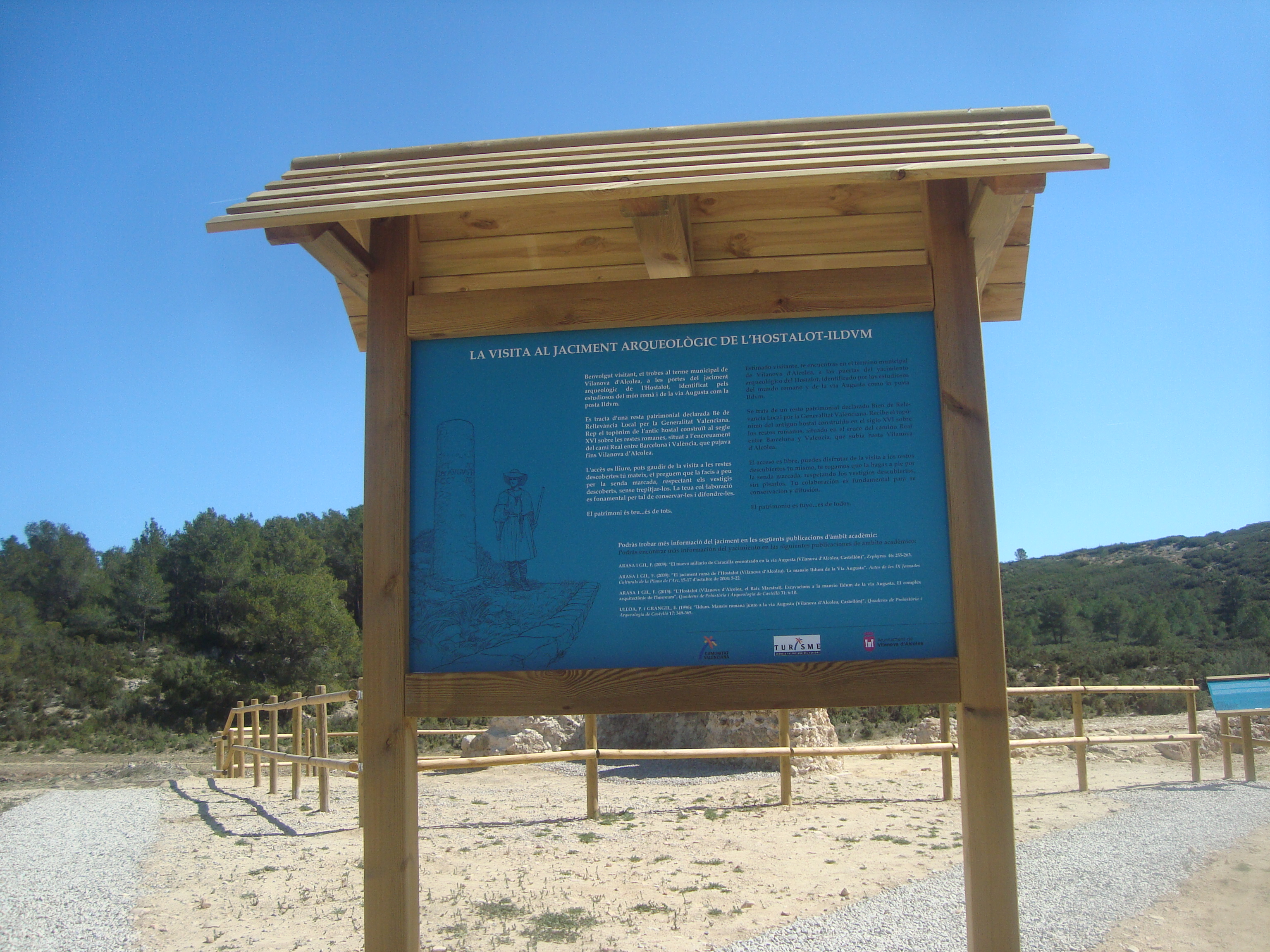 L'Hostalot 05.132-024.